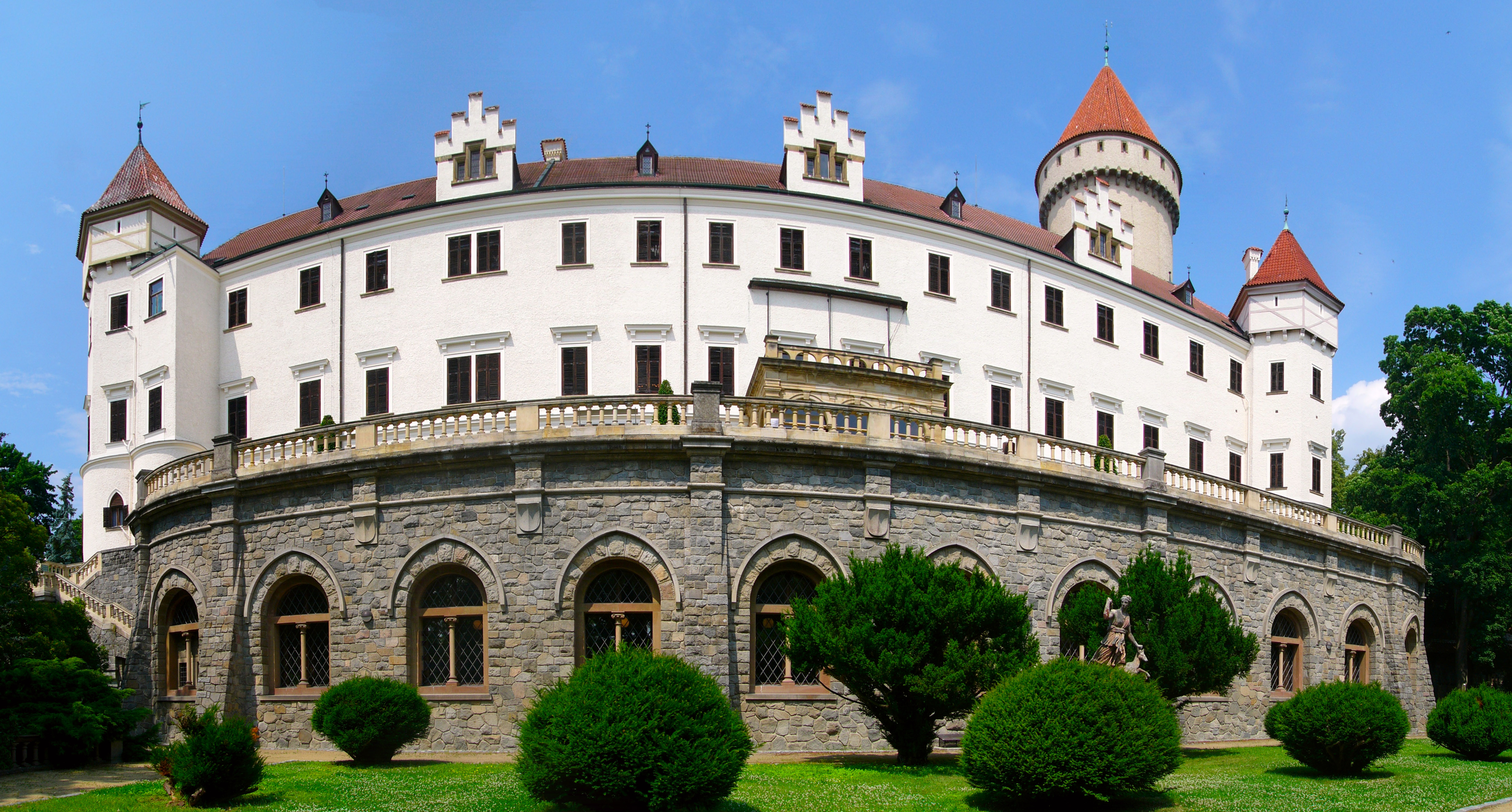 Panorama zámku Konopiště z jižní terasy